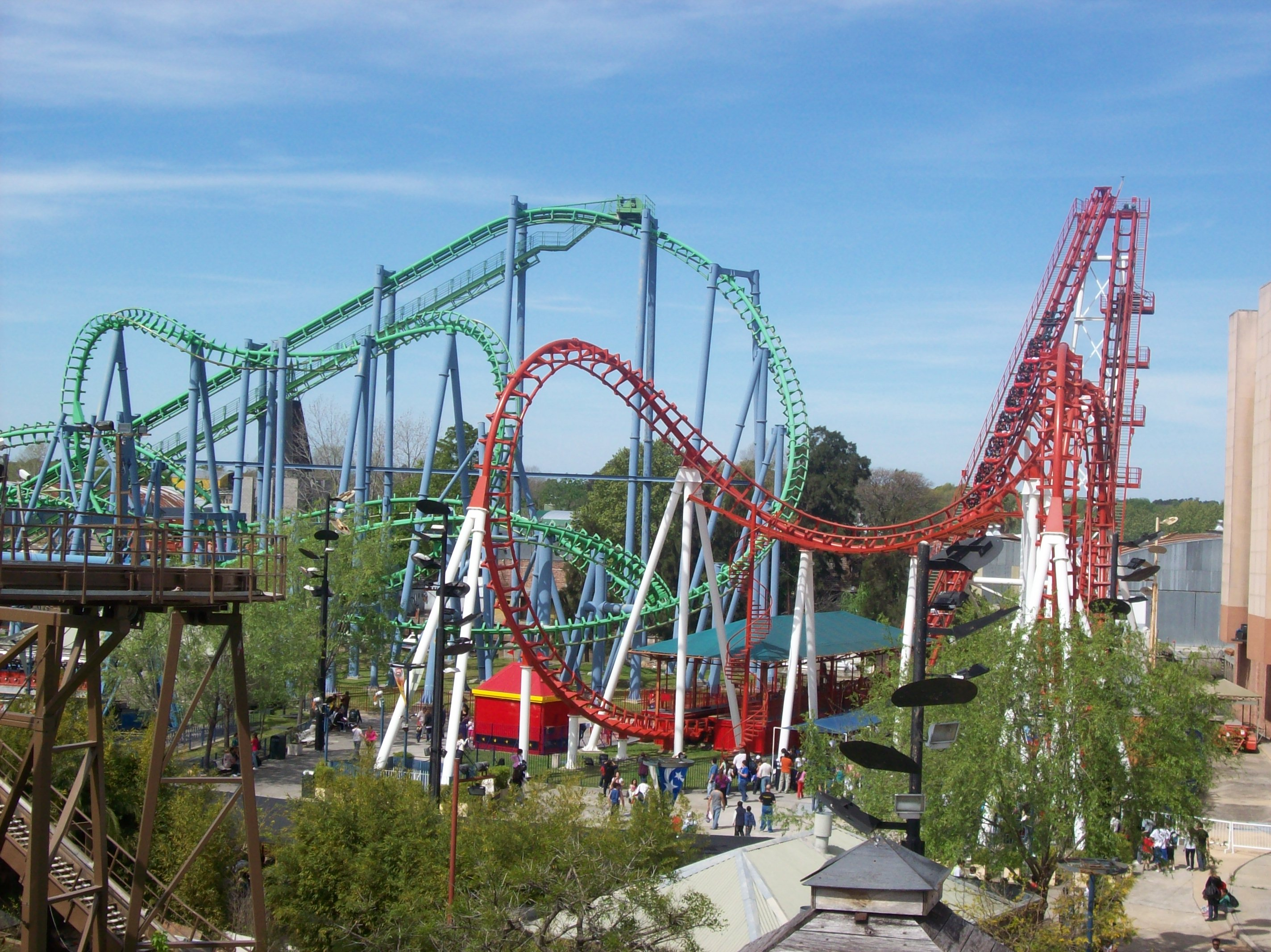 Montañas rusas en el Parque de la Costa, en la ciudad de Tigre, provincia de Buenos Aires, Argentina.